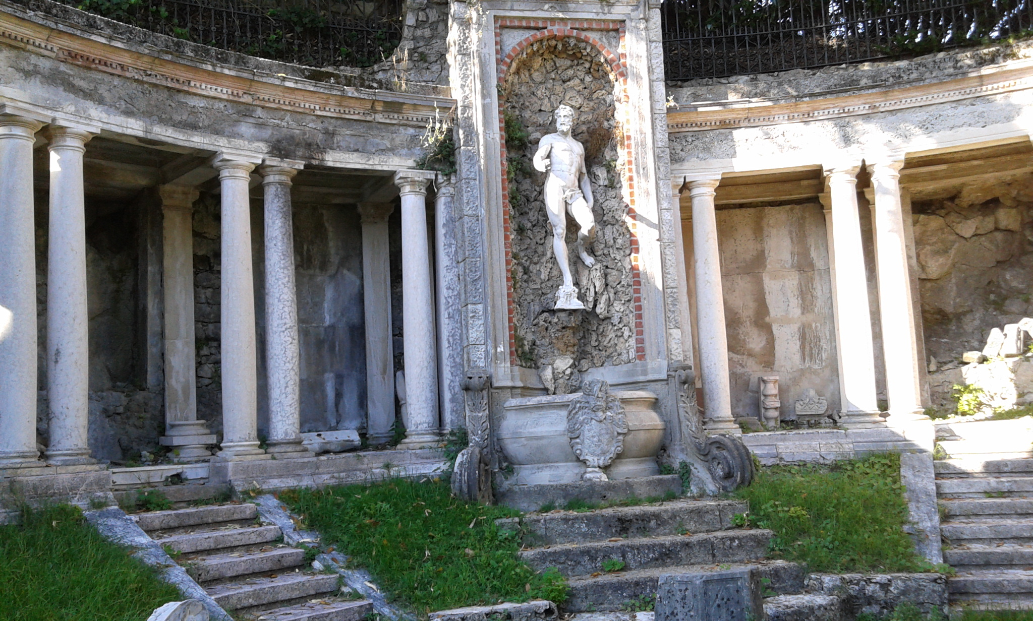 Casa Museo Lodovico Pogliaghi, Santa Maria del Monte, Varese